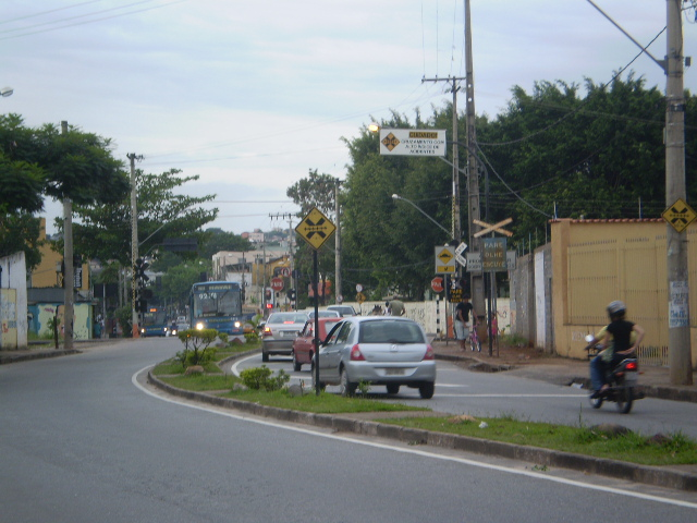 Passagem de nível de ferrovia da Companhia Vale sobre a avenida Itaituba, no bairro São Geraldo, Belo Horizonte, Minas Gerais, Brasil.